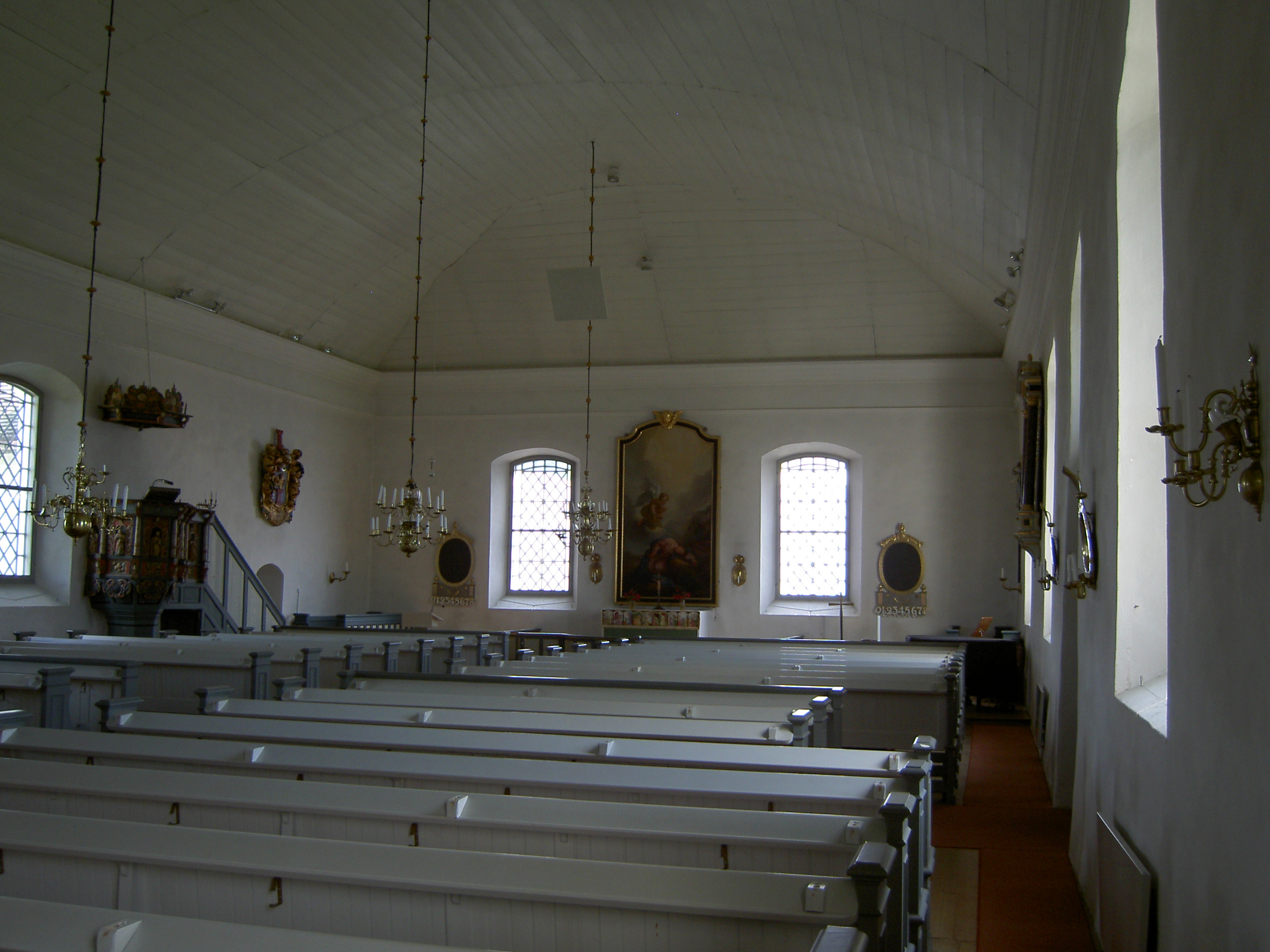 Kyrksal i Tjärstads kyrka